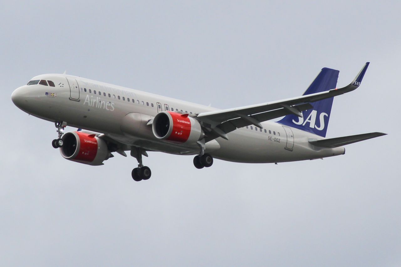 SE-DOZ A320NEO SAS